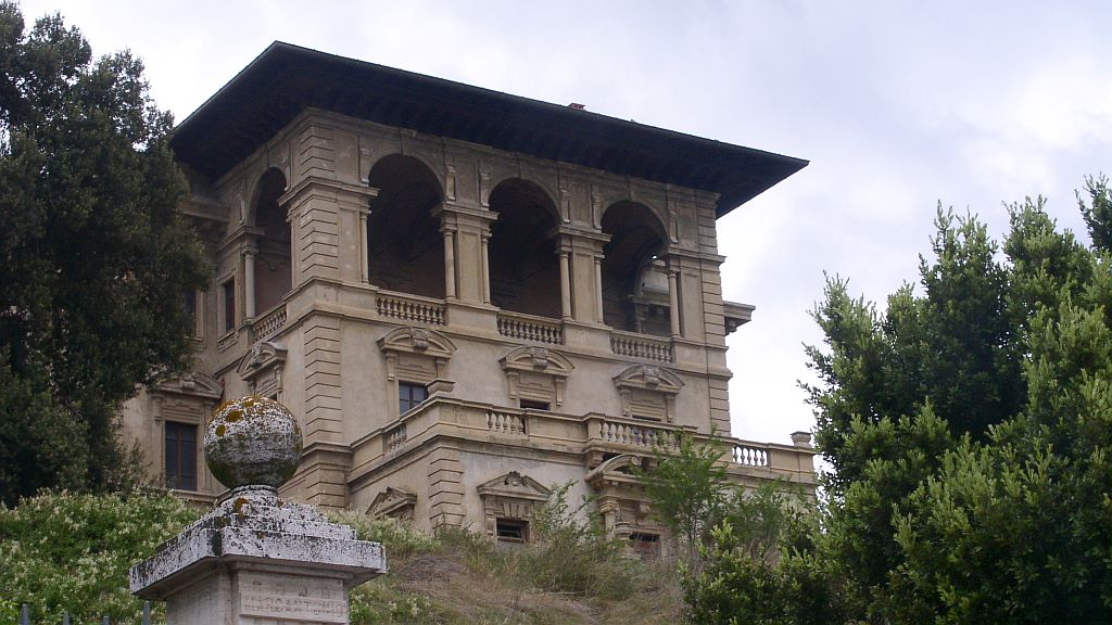 Vista del Palazzo Marcantonio. Mozzagrogna (CH), 3 giugno 2007. Foto scattata da me.